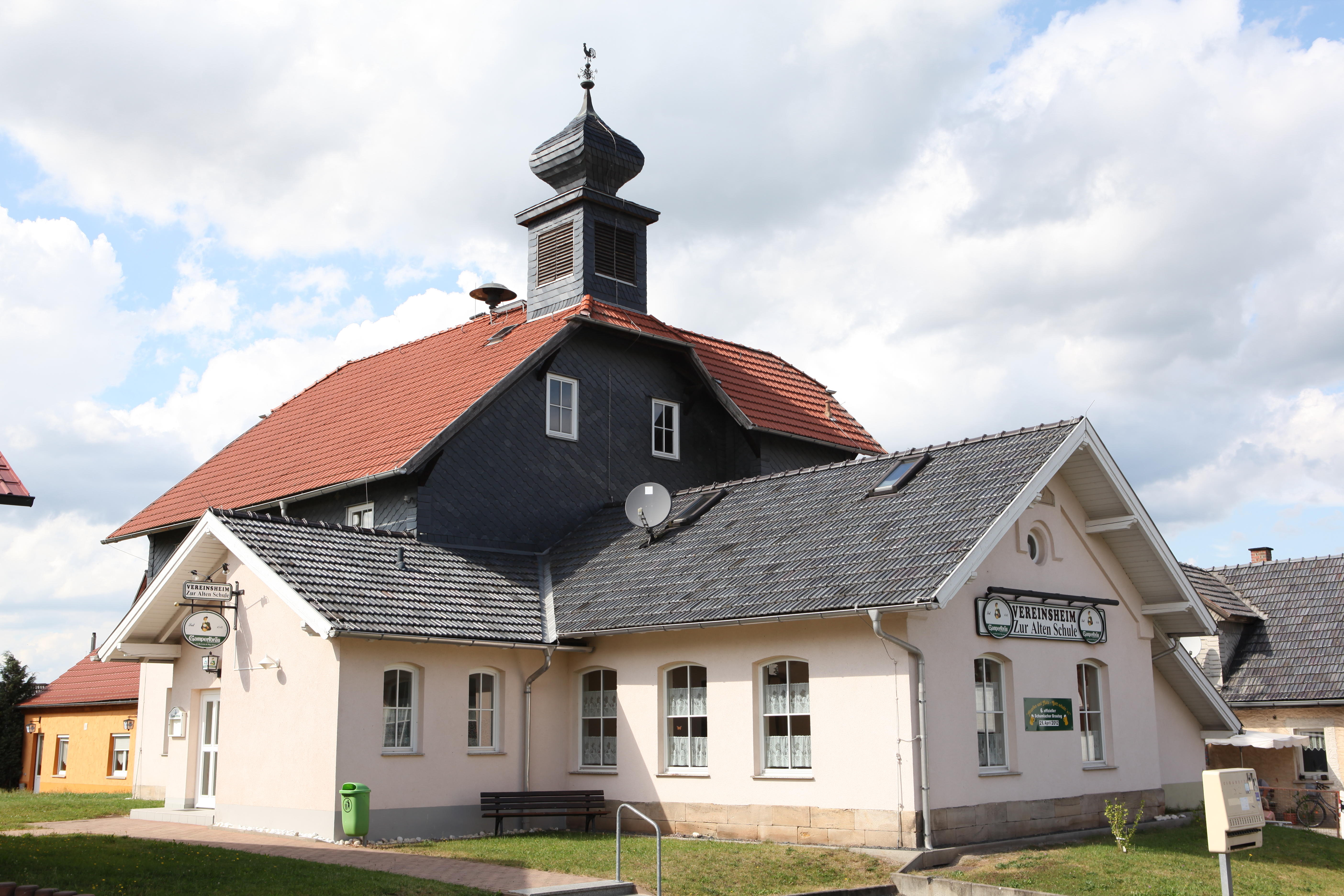 Alte Schule in Lindenberg, OT von Neuhaus-Schierschnitz